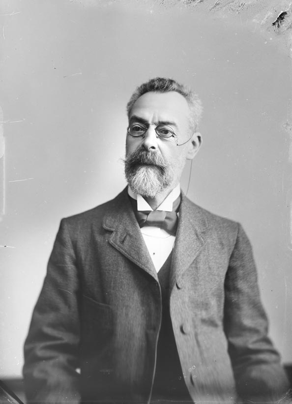 Retrat de bust del periodista i polític Eusebi Corominas i Cornell.